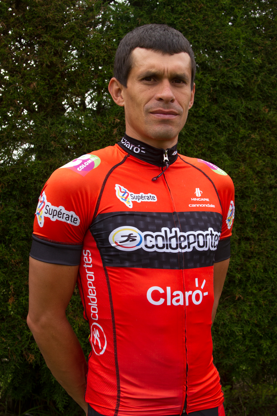 Luis Felipe Laverde con el maillot del Colombia Coldeportes en 2013.